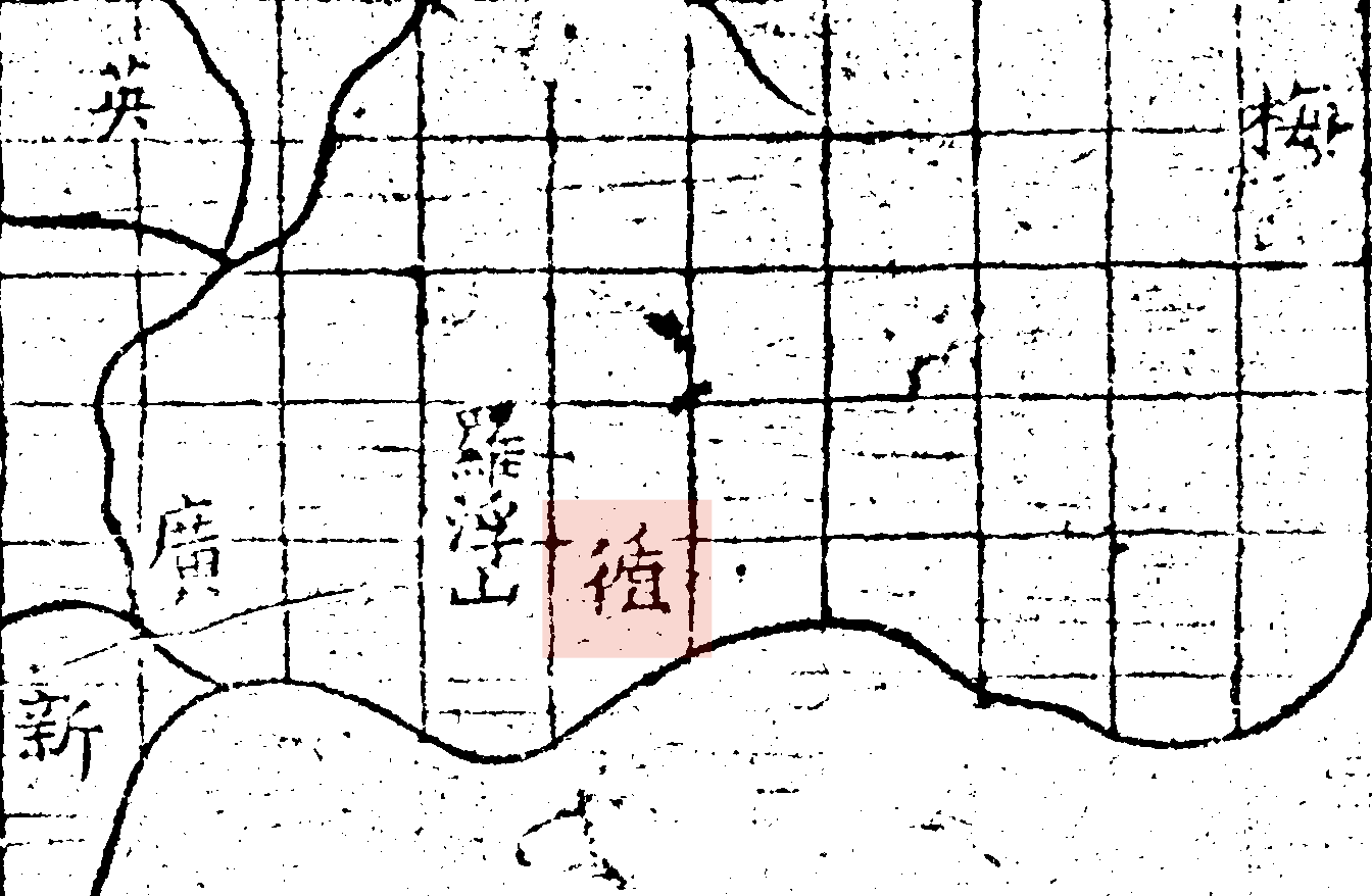 粵語: 禹跡圖中嘅循州